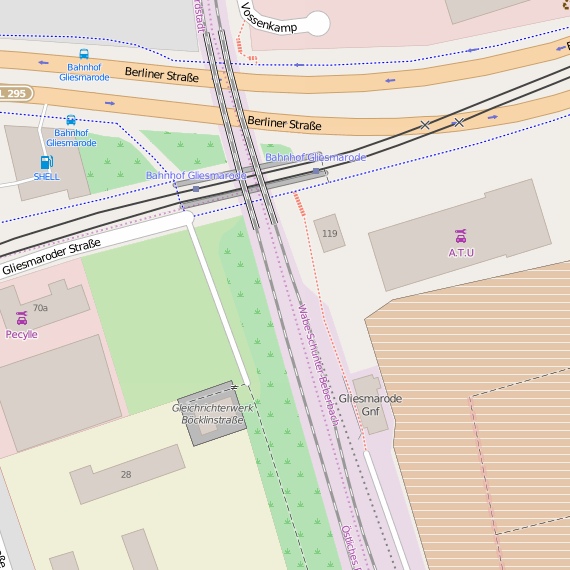 Plan des Bahnhofs Braunschweig-Gliesmarode 2015.